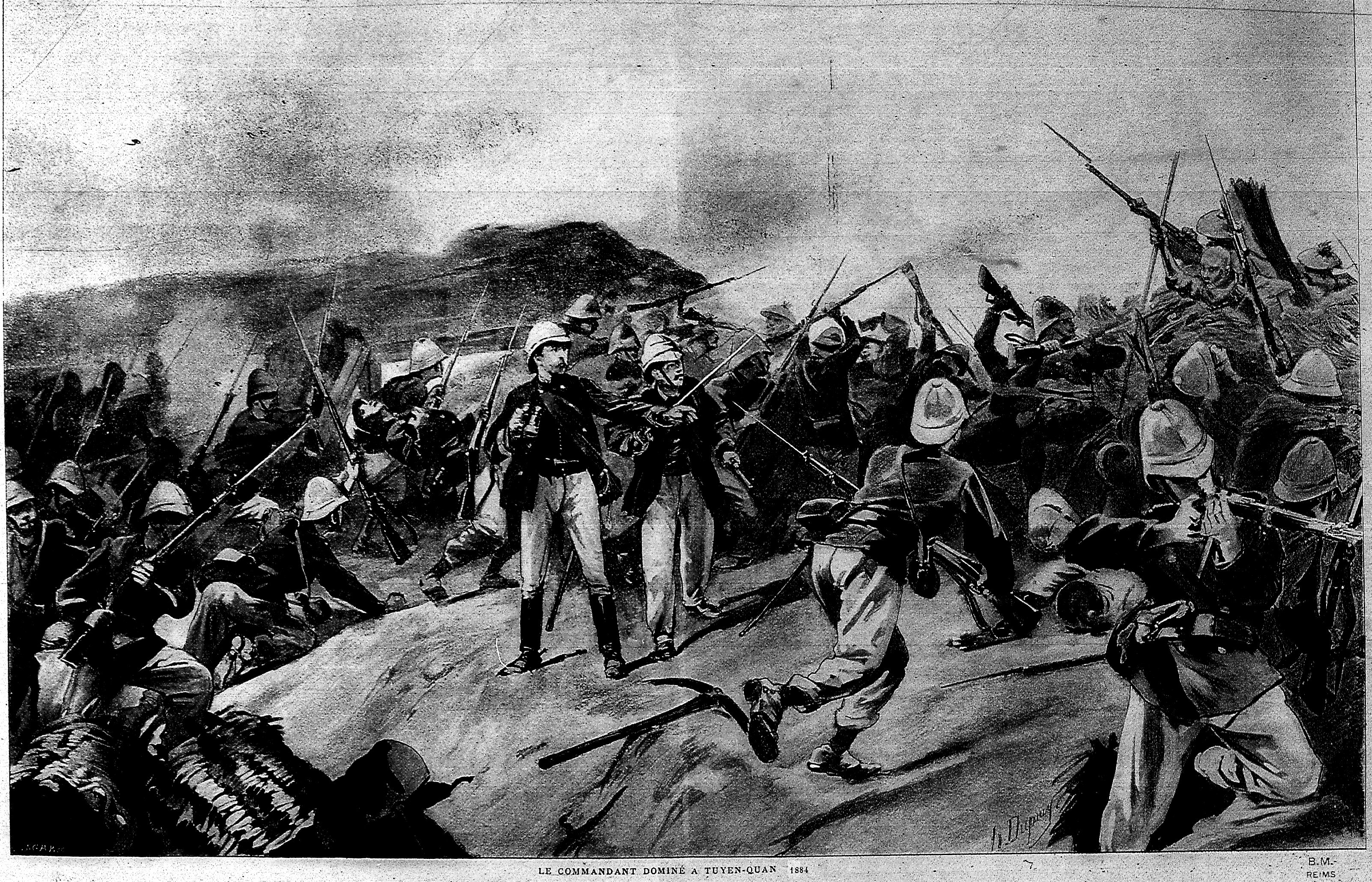 issu de la bibliothèque carnegie de reims.